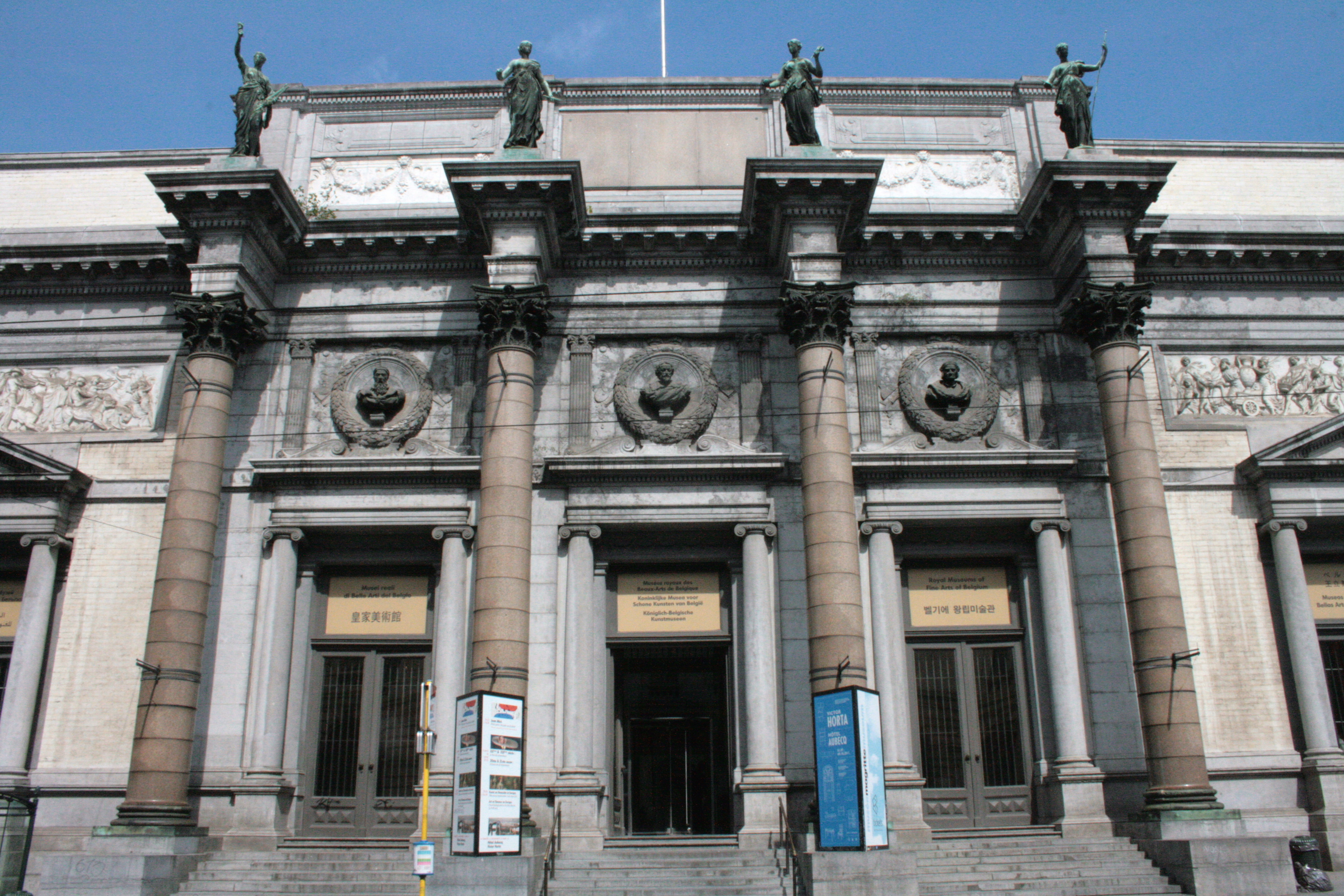 Musées Royaux des Beaux-Arts de Belgique, rue de la Régence 3, Bruxelles (Belgique). Façade principale